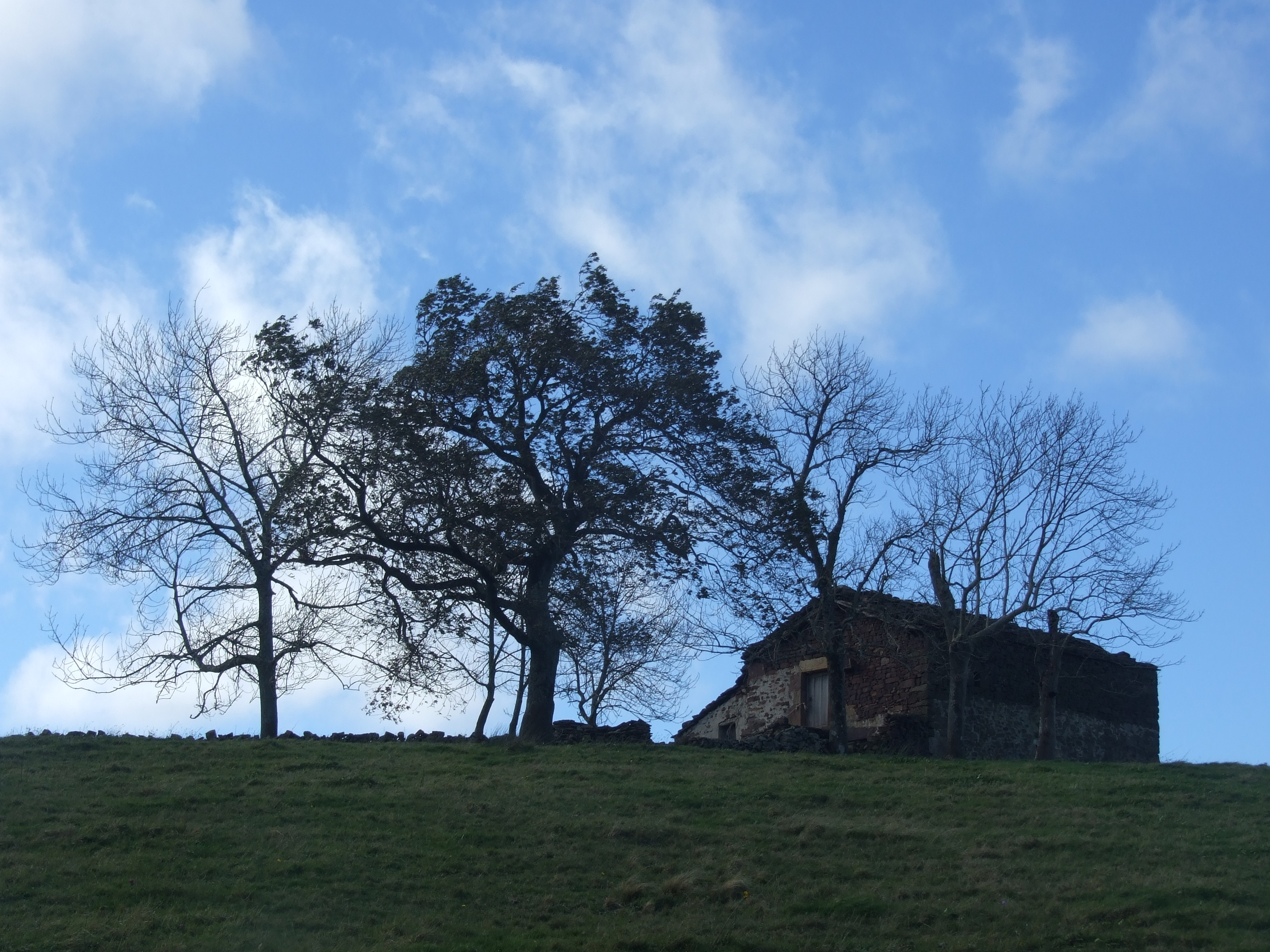 Ruta por los cabañales de Pisueña.